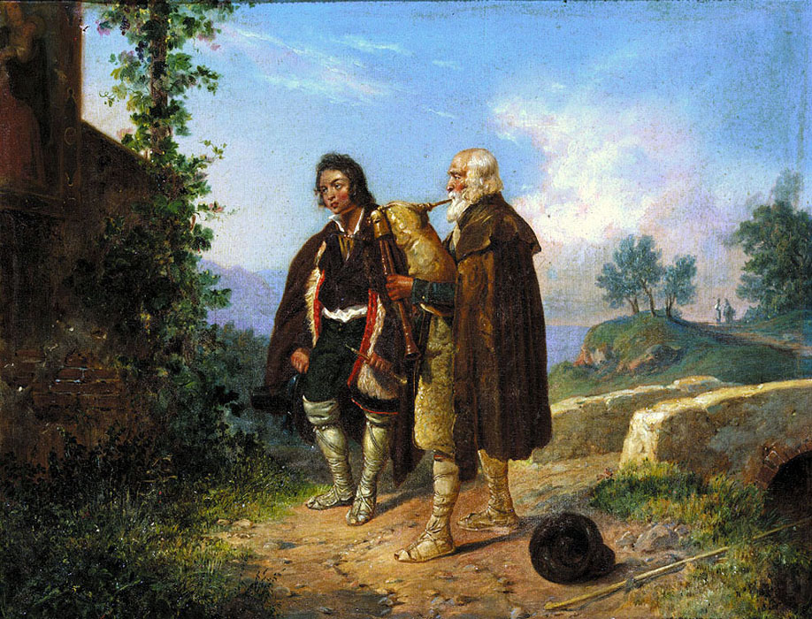 "Two peasants, one with the bagpipes by a bridge" Signed at lower left "L. Vogel" Oil on canvas, 33x41 cm, framed